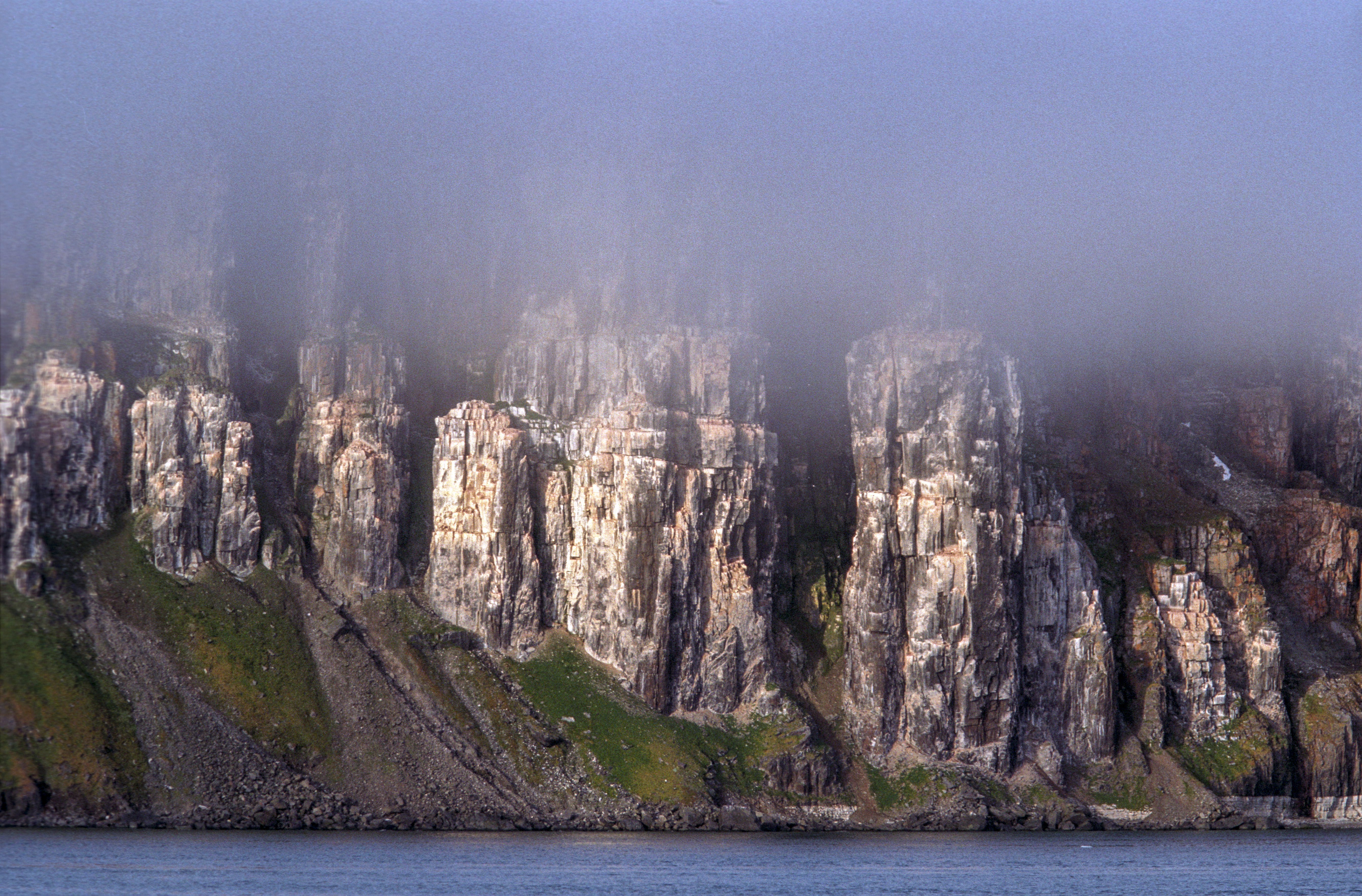 Spitsbergen, Alkefjellet